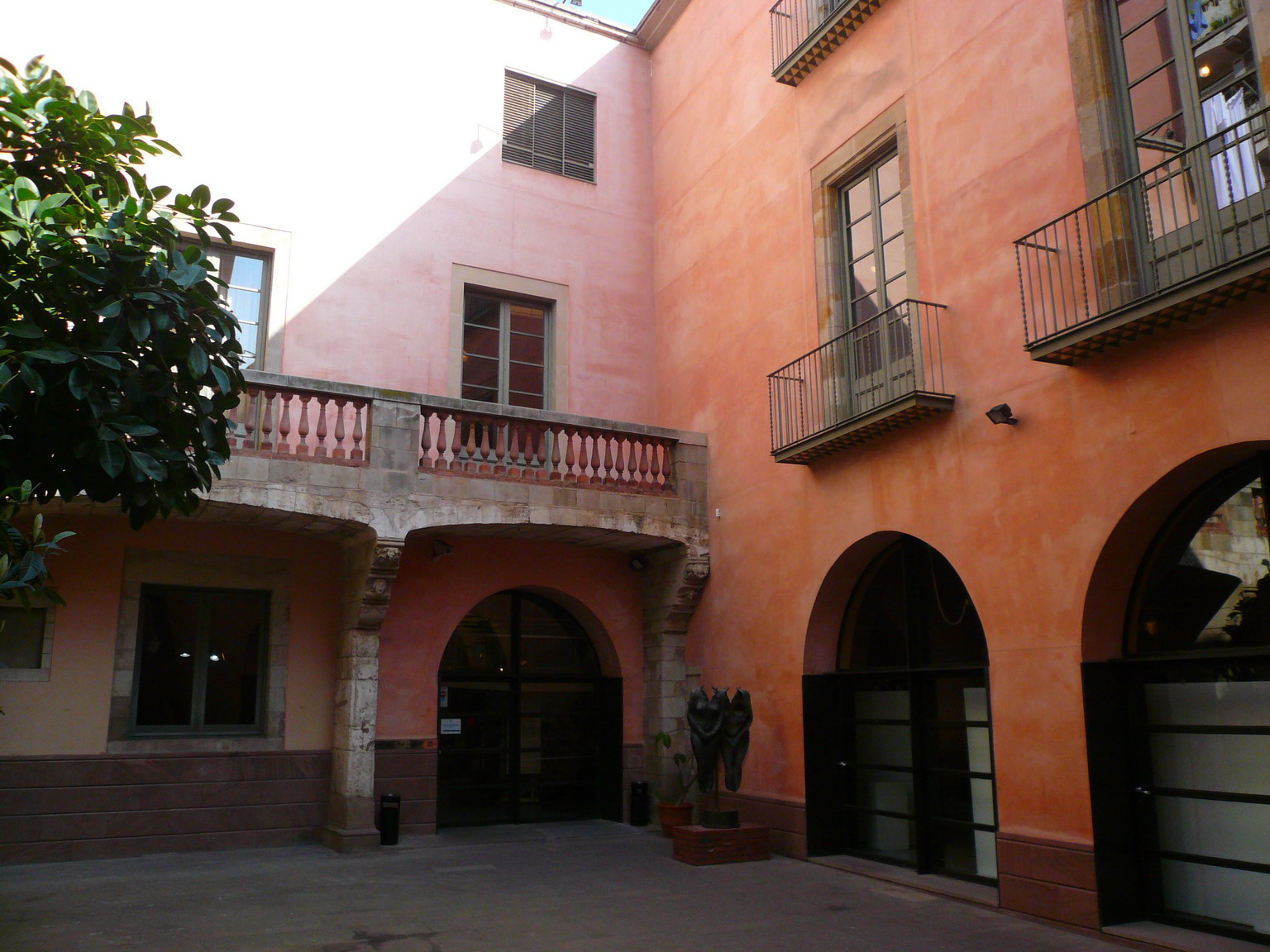 Centre cívic Pati Llimona